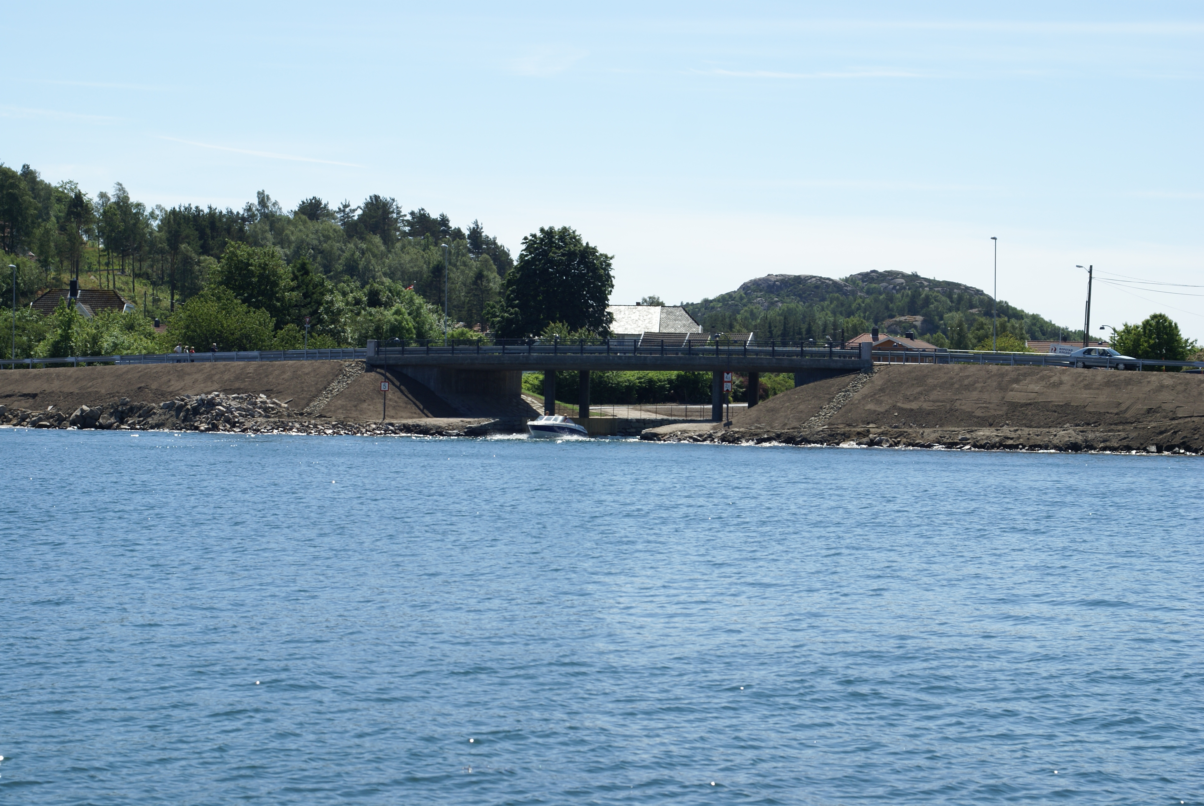 Innseiling fra nord, Lehnesfjorden